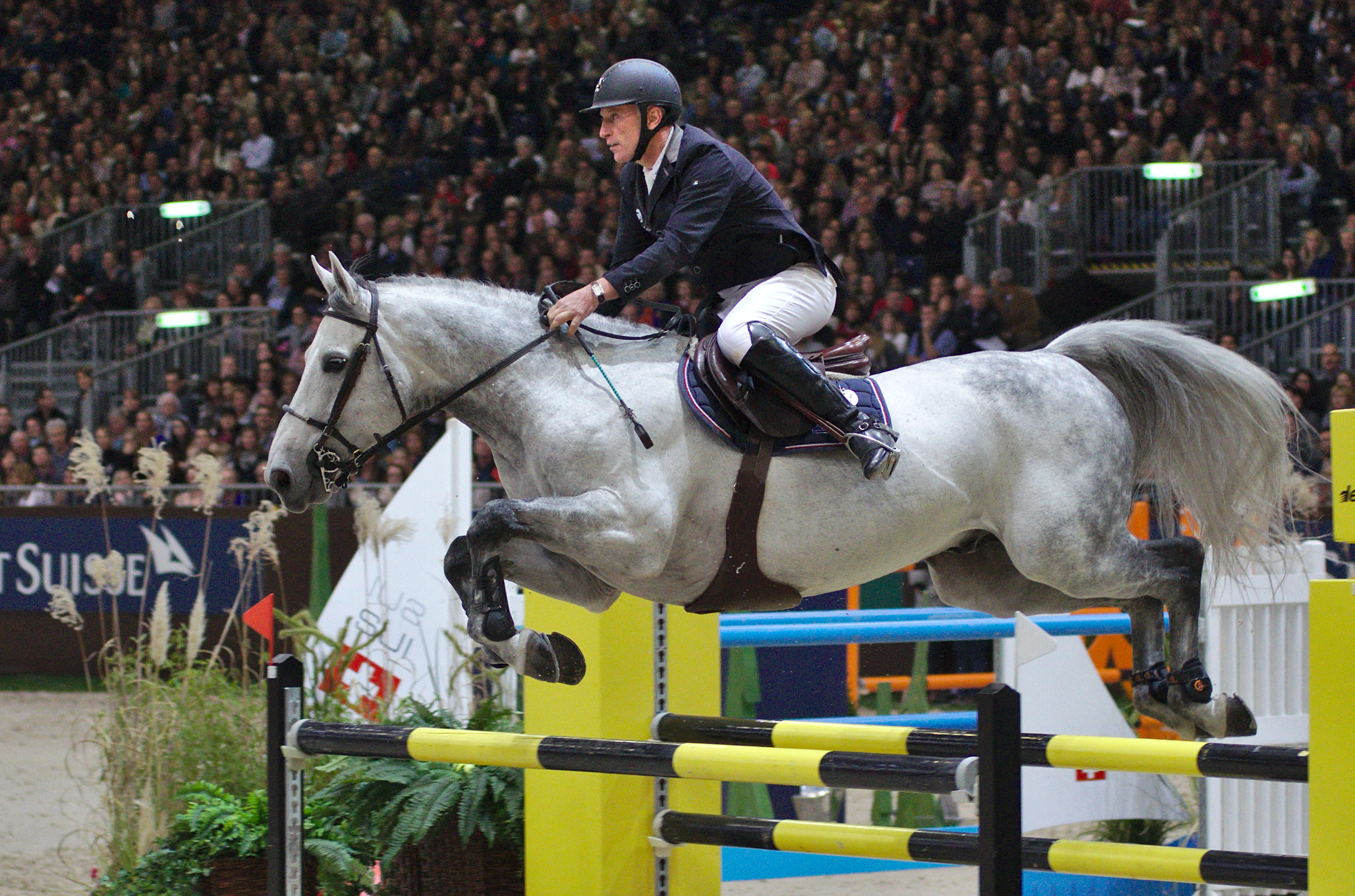 54eme CHI de Genève - 20141213 - Prix Credit Suisse - Roger Yves Bost et Pégase du Murier